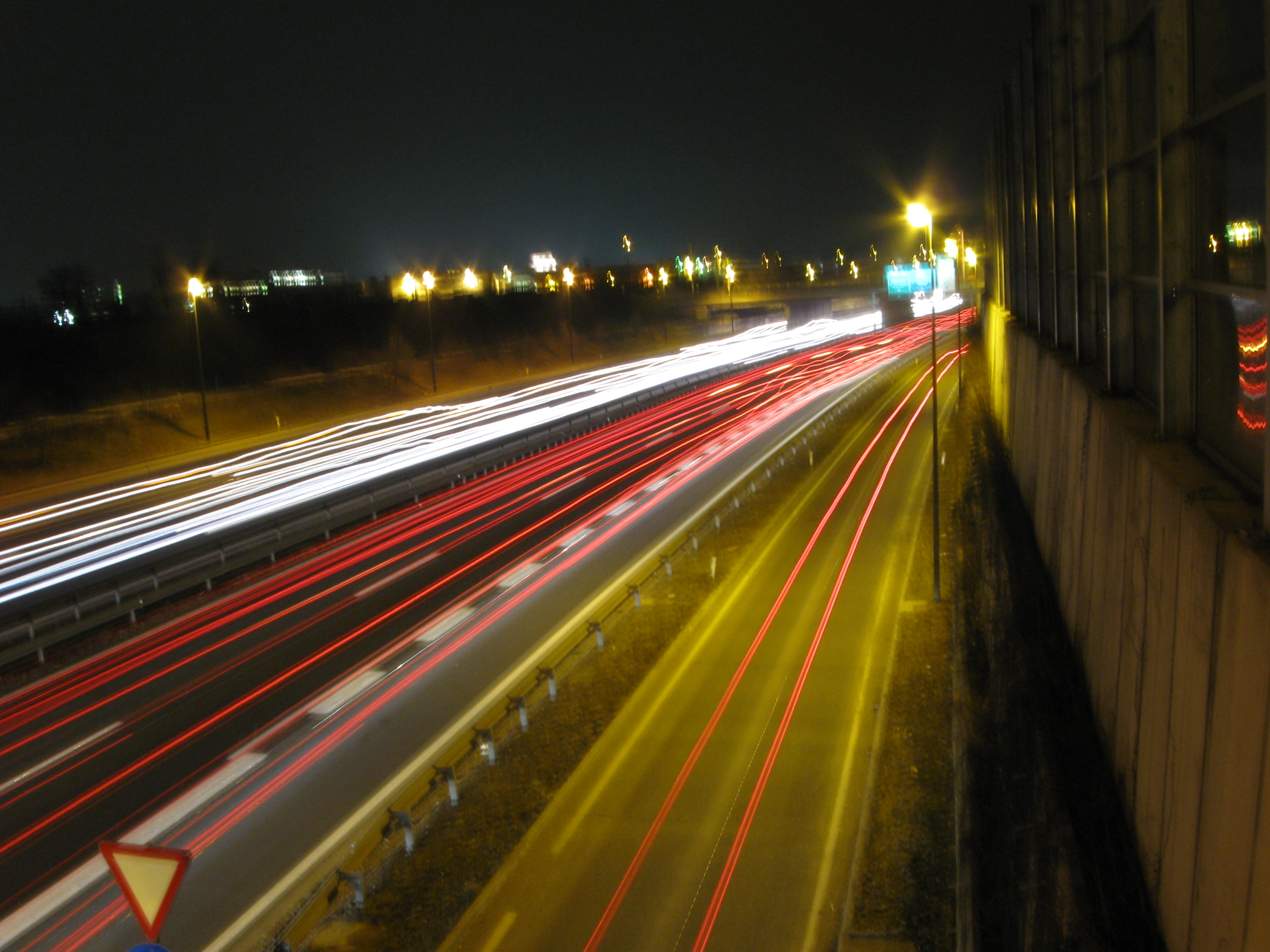 Auto-put.